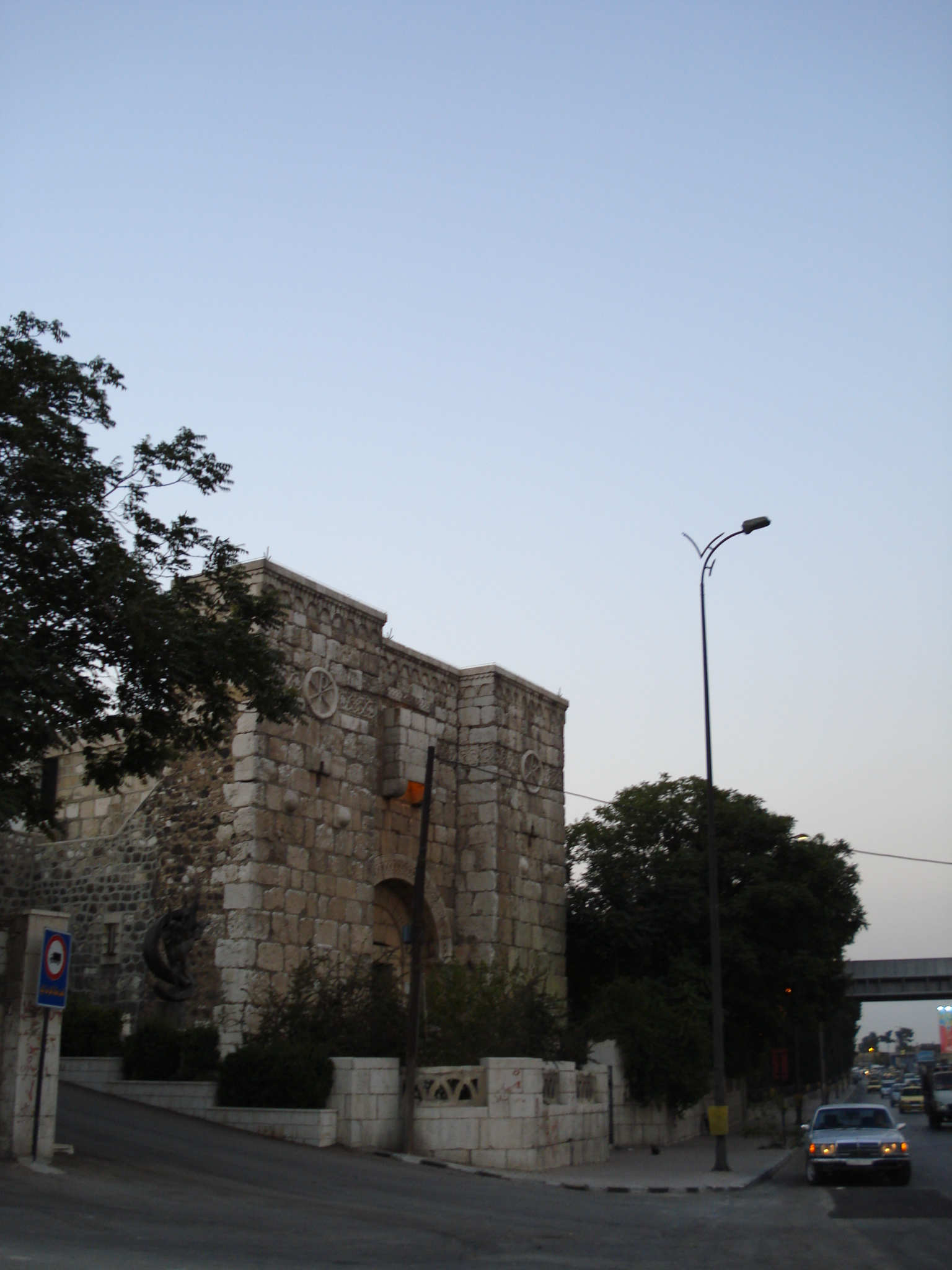 باب كيسان جنوب شرق دمشق القديمة